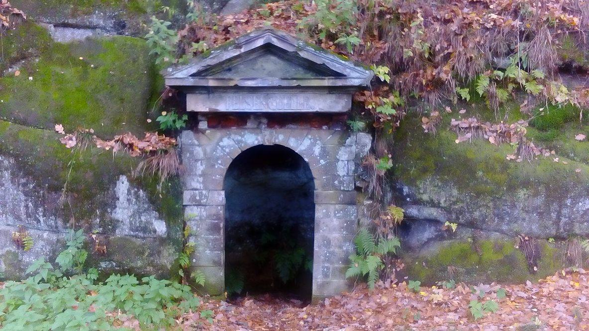 Skalne Źródełko w Kruczych Skałach